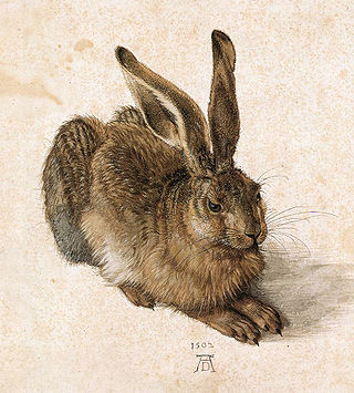 Aquarell eine jungen Feldhasen